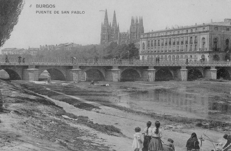 Puente de San Pablo - Burgos - Fototipia de Hauser y Menet. Madrid - Postal 140 x 90 B/N